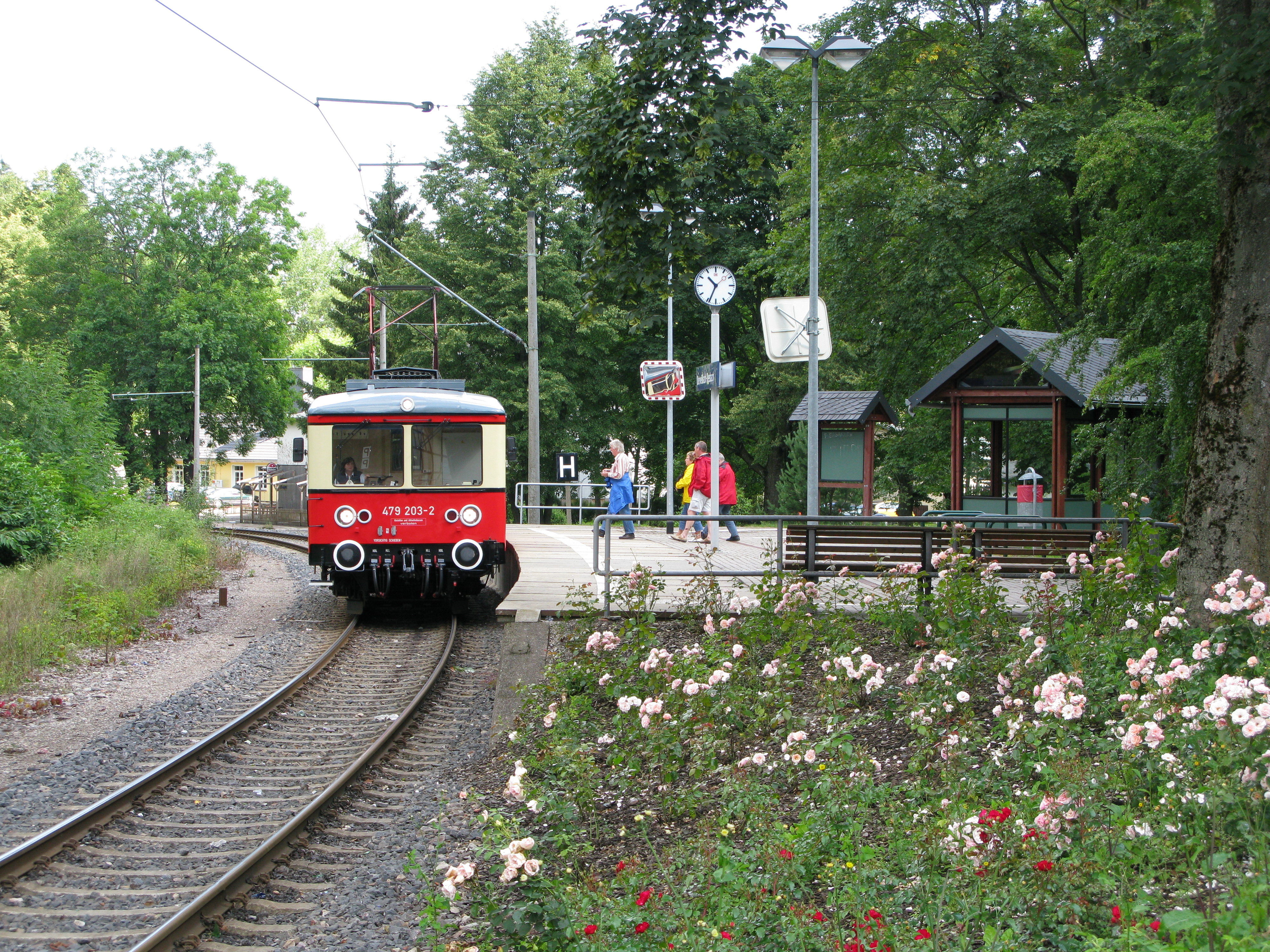 Haltepunkt Oberweißbach-Deesbach (ehemals Bahnhof) der Oberweißbacher Bergbahn